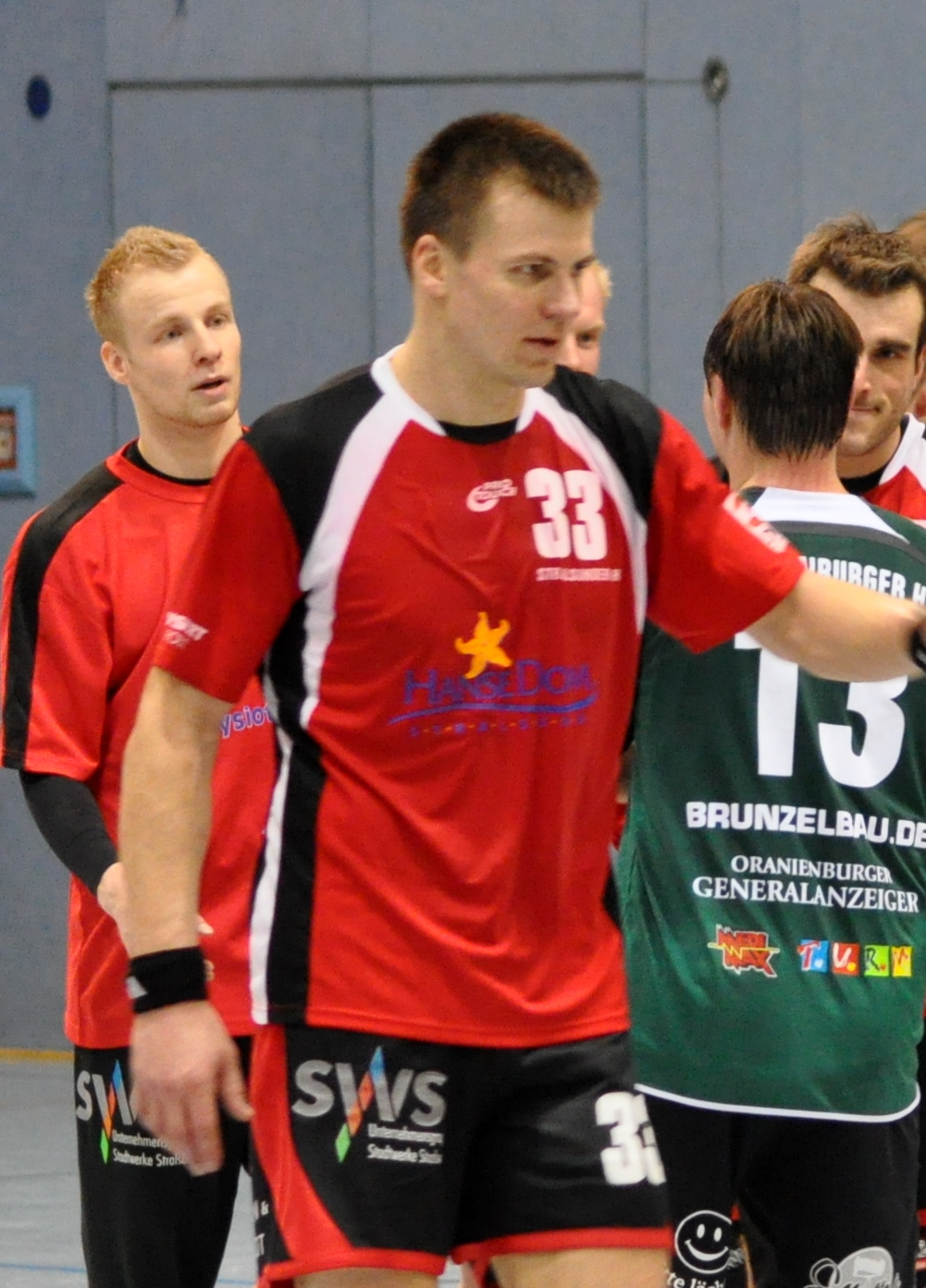 Bilder vom Punktspiel des Stralsunder HV in der de:3. Liga (Handball) am 12. Februar 2011 in der Vogelsanghalle Stralsund gegen den Oranienburger HC (35:34). Mārtiņs Lībergs am 12.2.2011, nach dem Spiel.